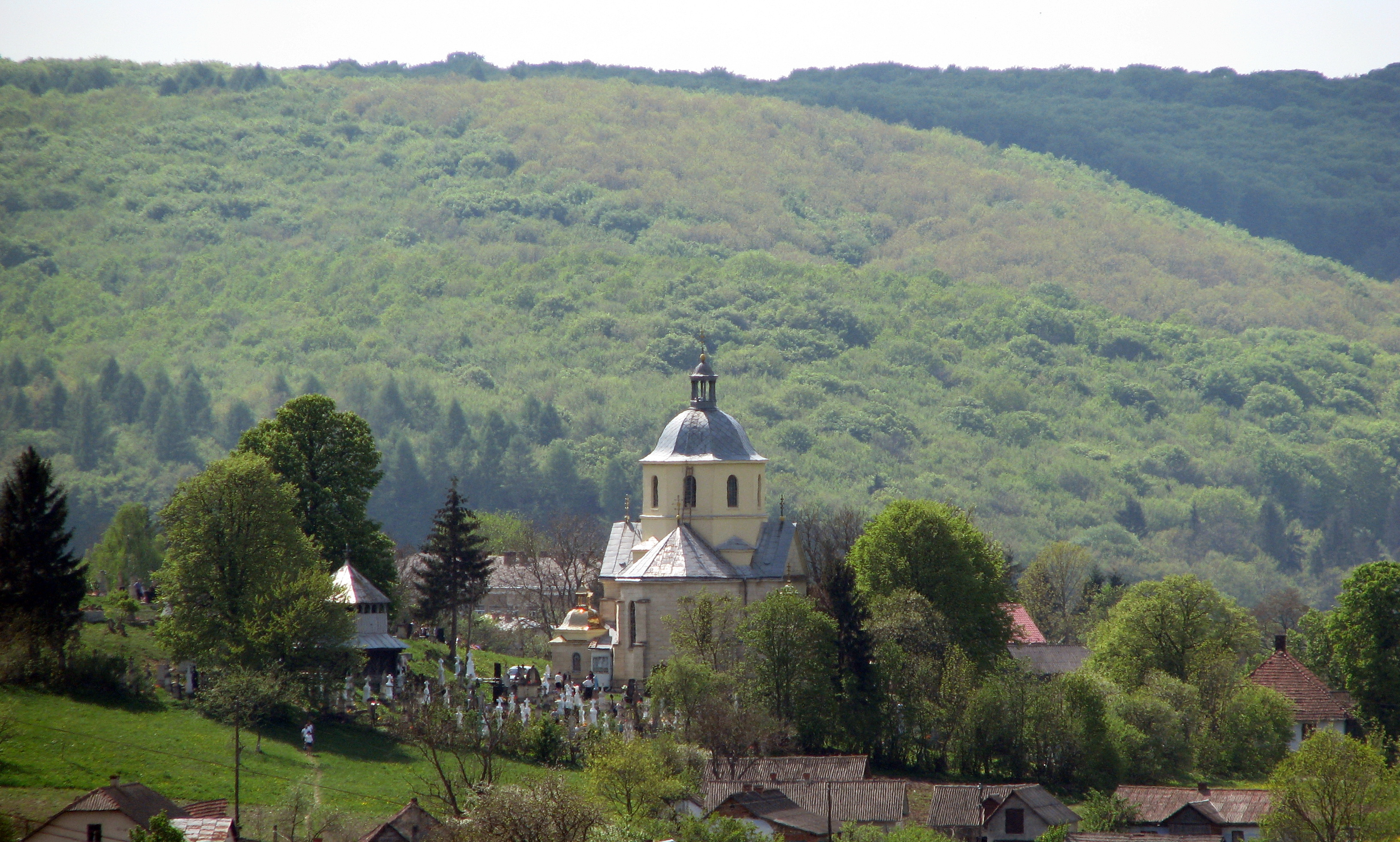 Церква Введення в храм Пречистої Діви Марії (мур.), село Куропатники